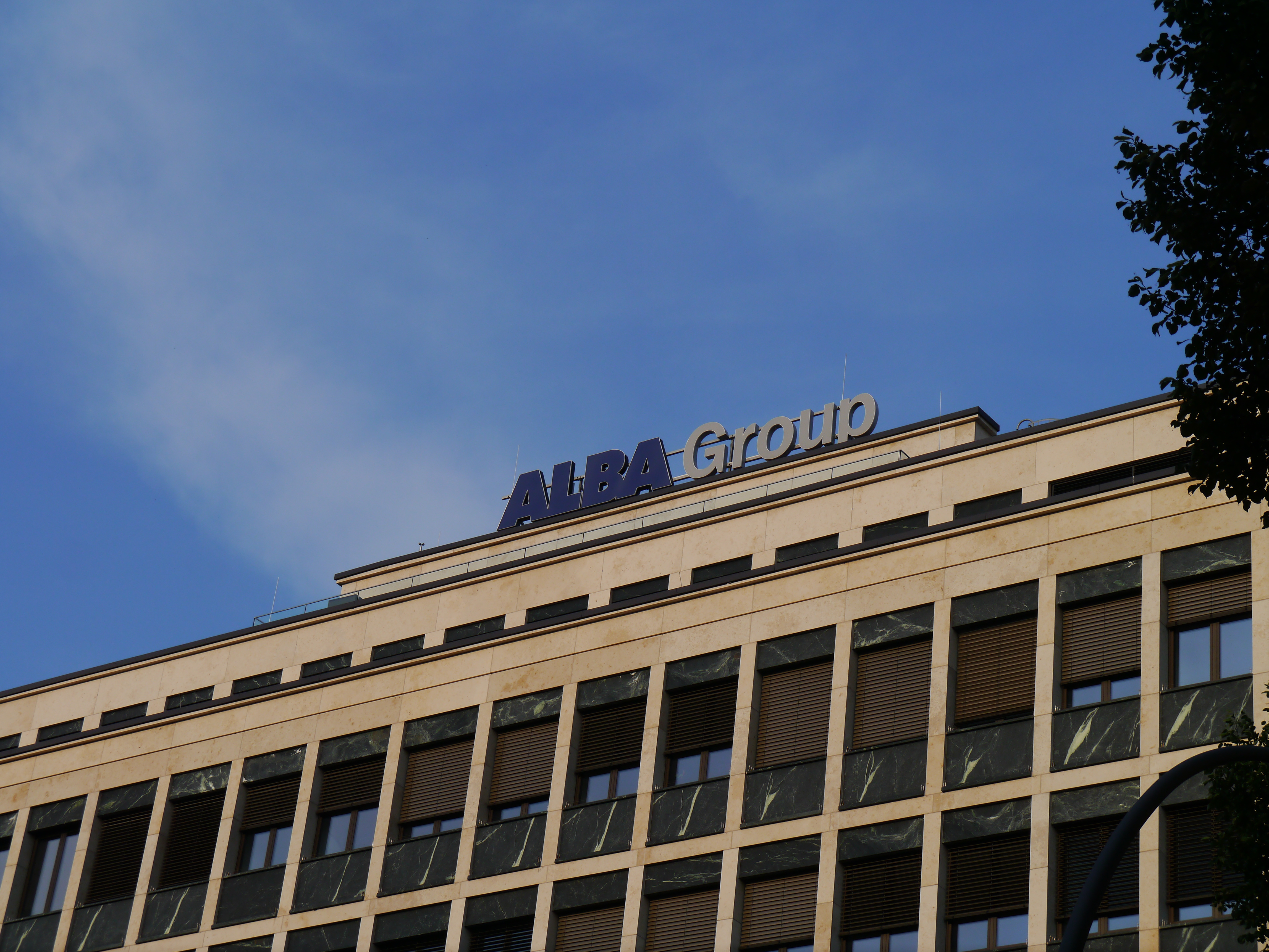 ALBA Group Zentrale Berlin-Charlottenburg, Knesebeckstraße 56, 10719 Berlin, 2015.